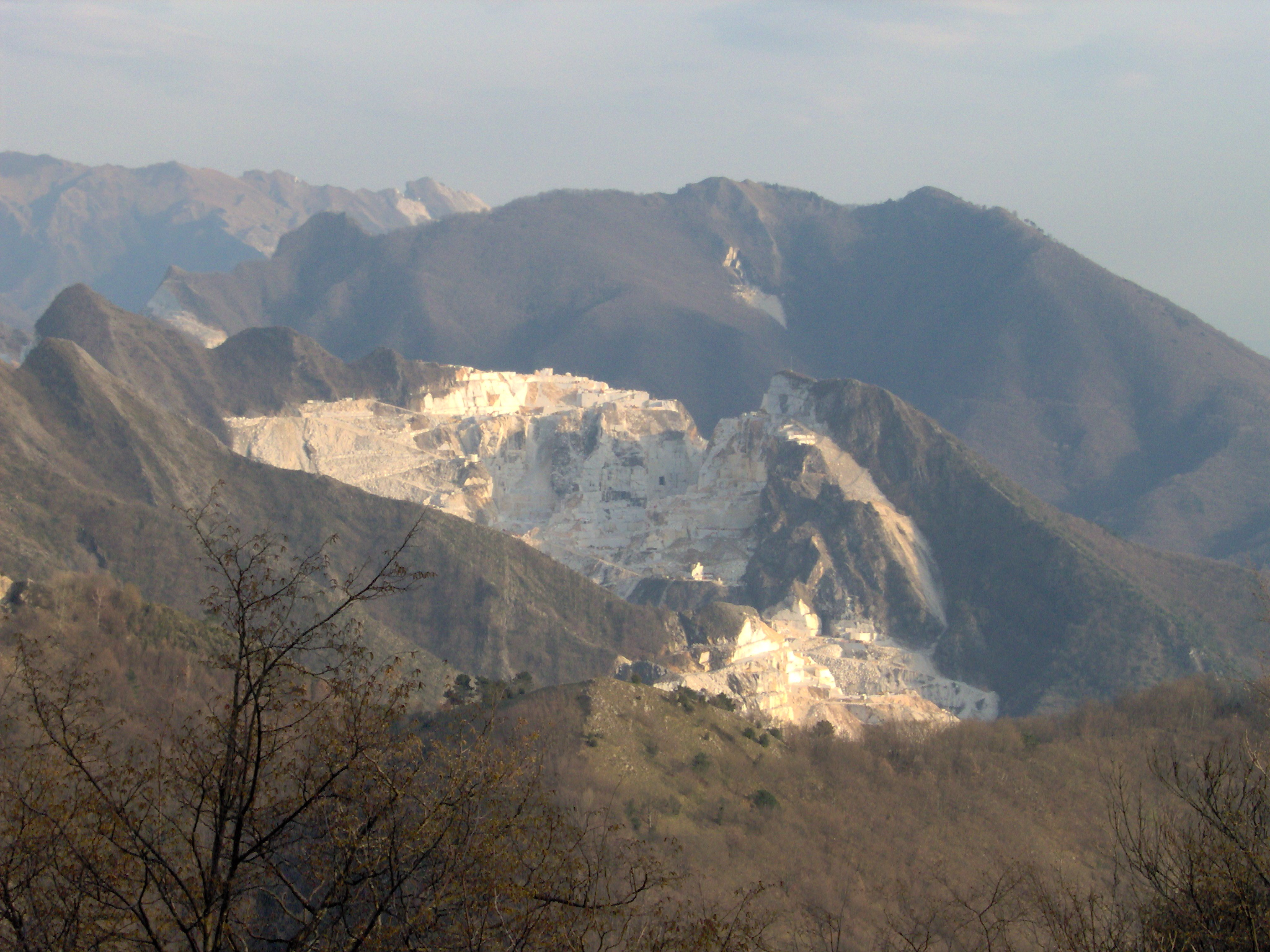 Le cave di marmo viste da Campo Cecina